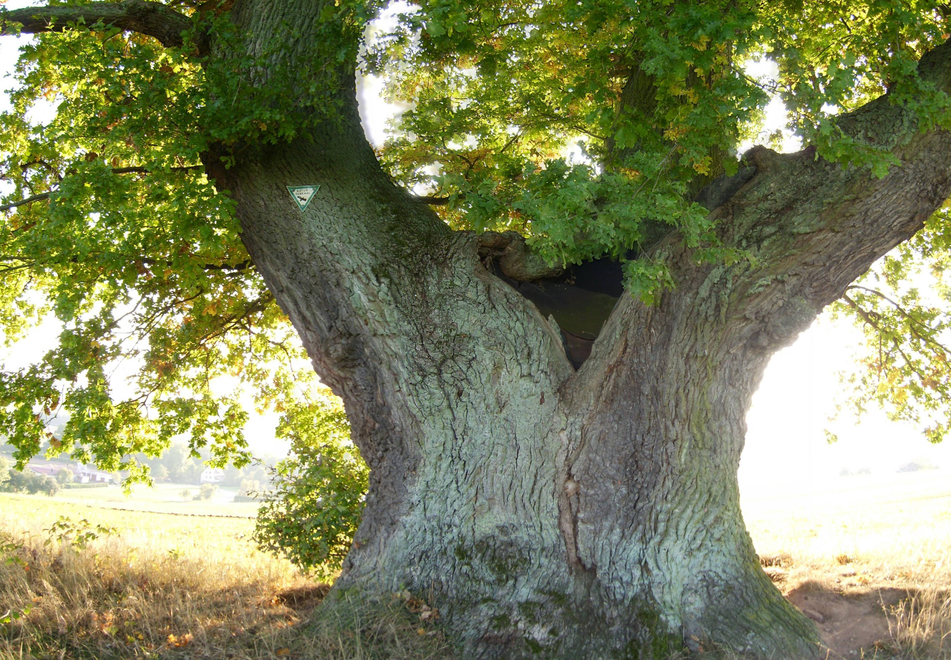 Stamm der mehrere 100 Jahre alten Gerichtseiche am Galgenberg (eigentlich Gänseberg) bei Rosenthal im Burgwald. Der Stammumfang der Stieleiche beträgt über 7m.